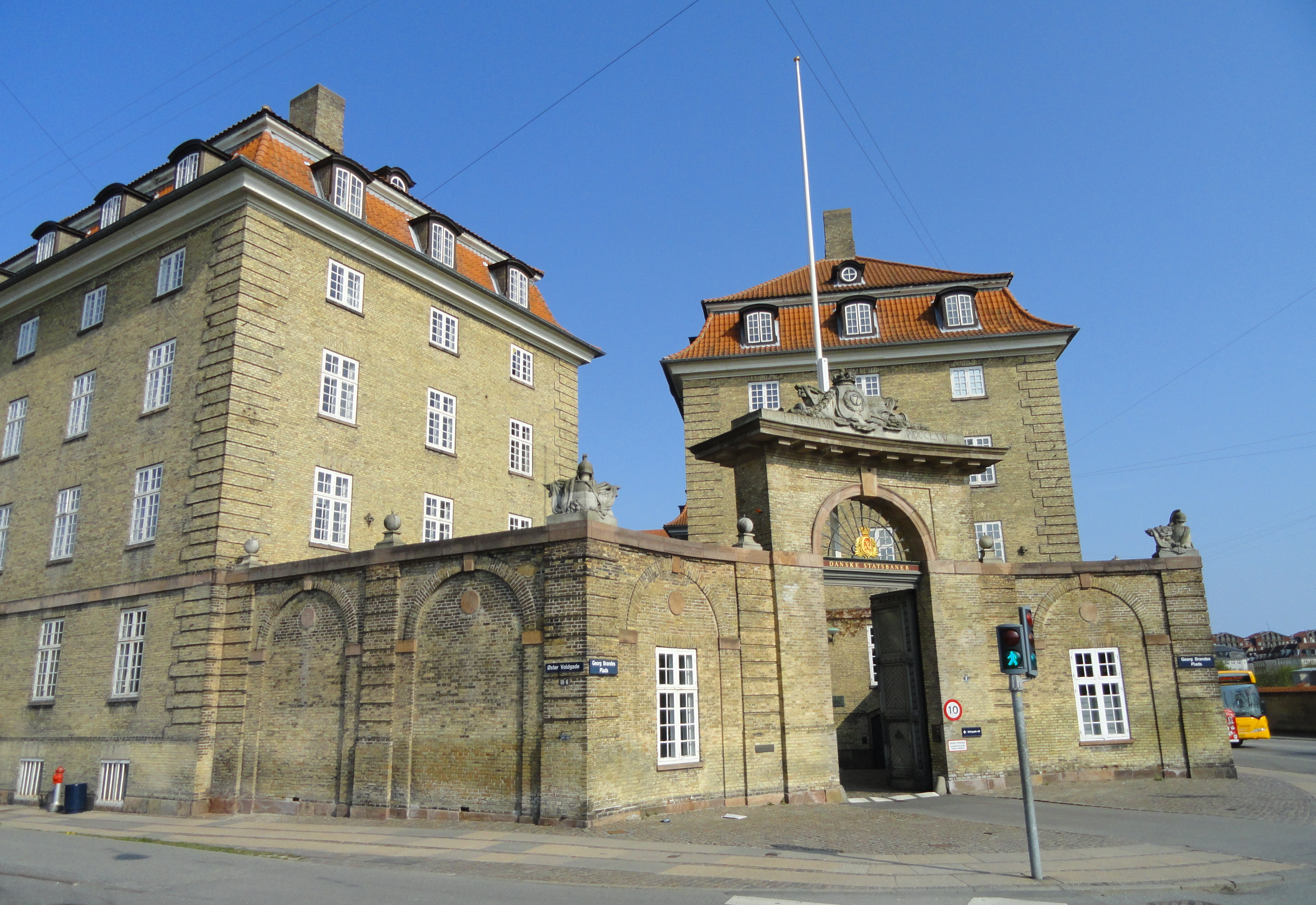 Sølvgade Barracks, Copenhagen, Denmark.